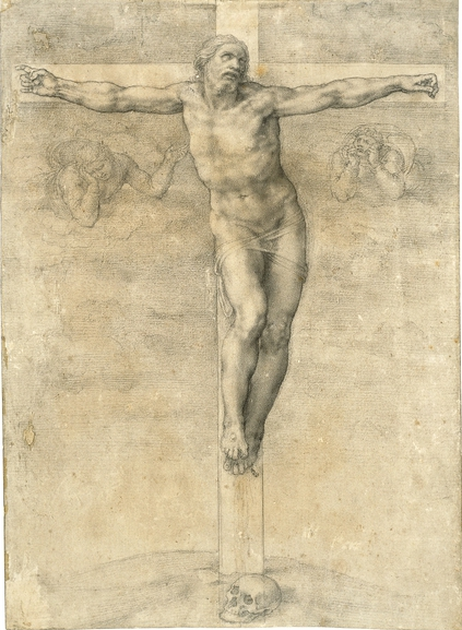 made for presentation to Vittoria Colonna.